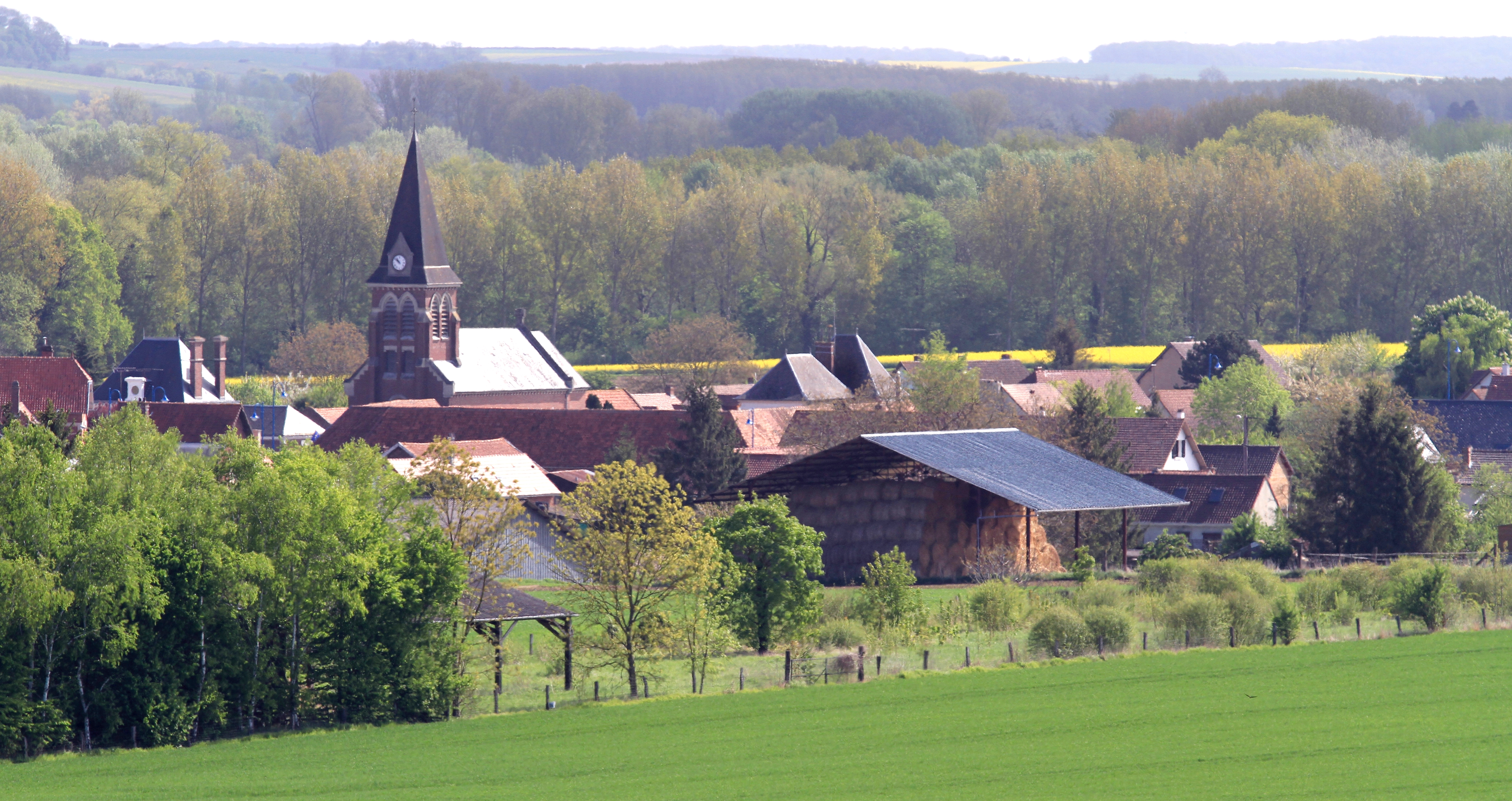 Village de Hailles depuis la route de Dommartin